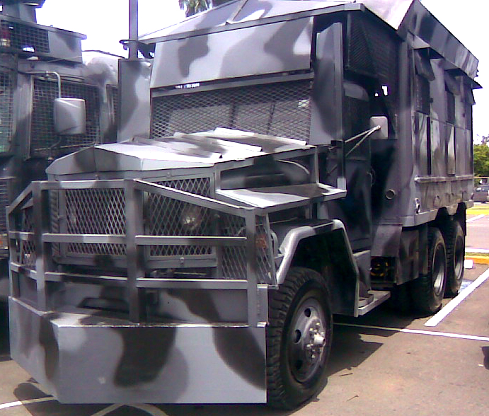 LA BESTIA: es un vehiculo policial de la unidad Control de Multiotudes de la Policía Nacional de Panamá que es utilizado para insertar efectivos policiales antidisturbios en zonas de conflicto que podrian resultar peligrosas para acercarse a pie. Un ejemplo podría ser un edificio en construcción en el cual se encuentren manifestantes acuartelados lanzando objetos contundentes desde lo alto del edificio; "La Bestia" avanzaría hasta la base del edificio cargada de efectivos policiales los cuales desembarcarían de forma segura tomando el control del mismo.